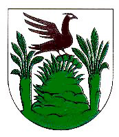 Zborov nad Bystricou, Slovakia